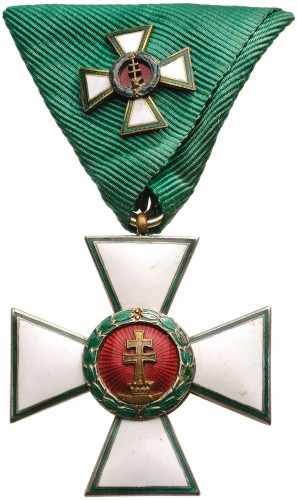 Magyar Érdemkereszt középkeresztjének kisdíszítménye